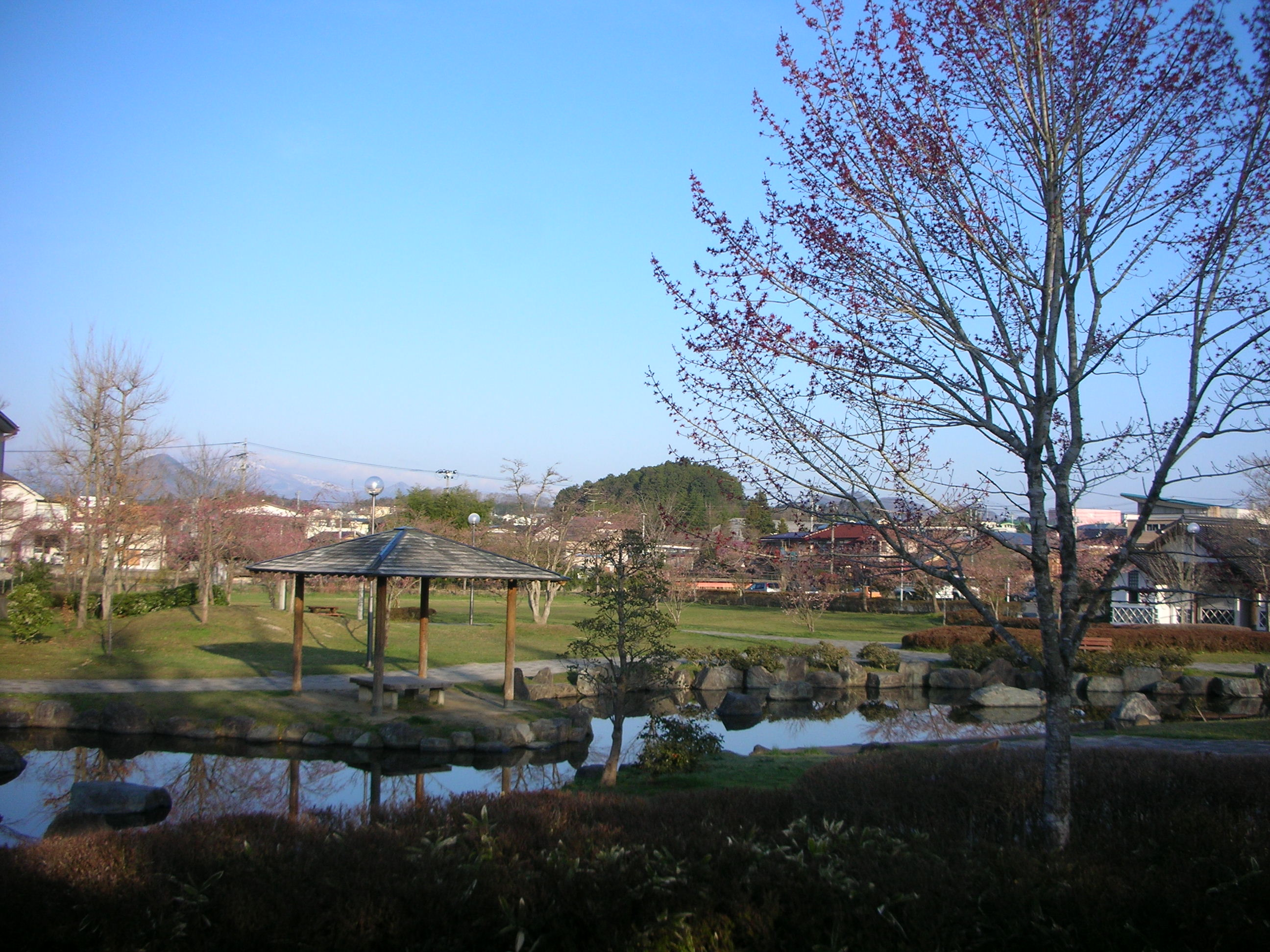 しんまち公園